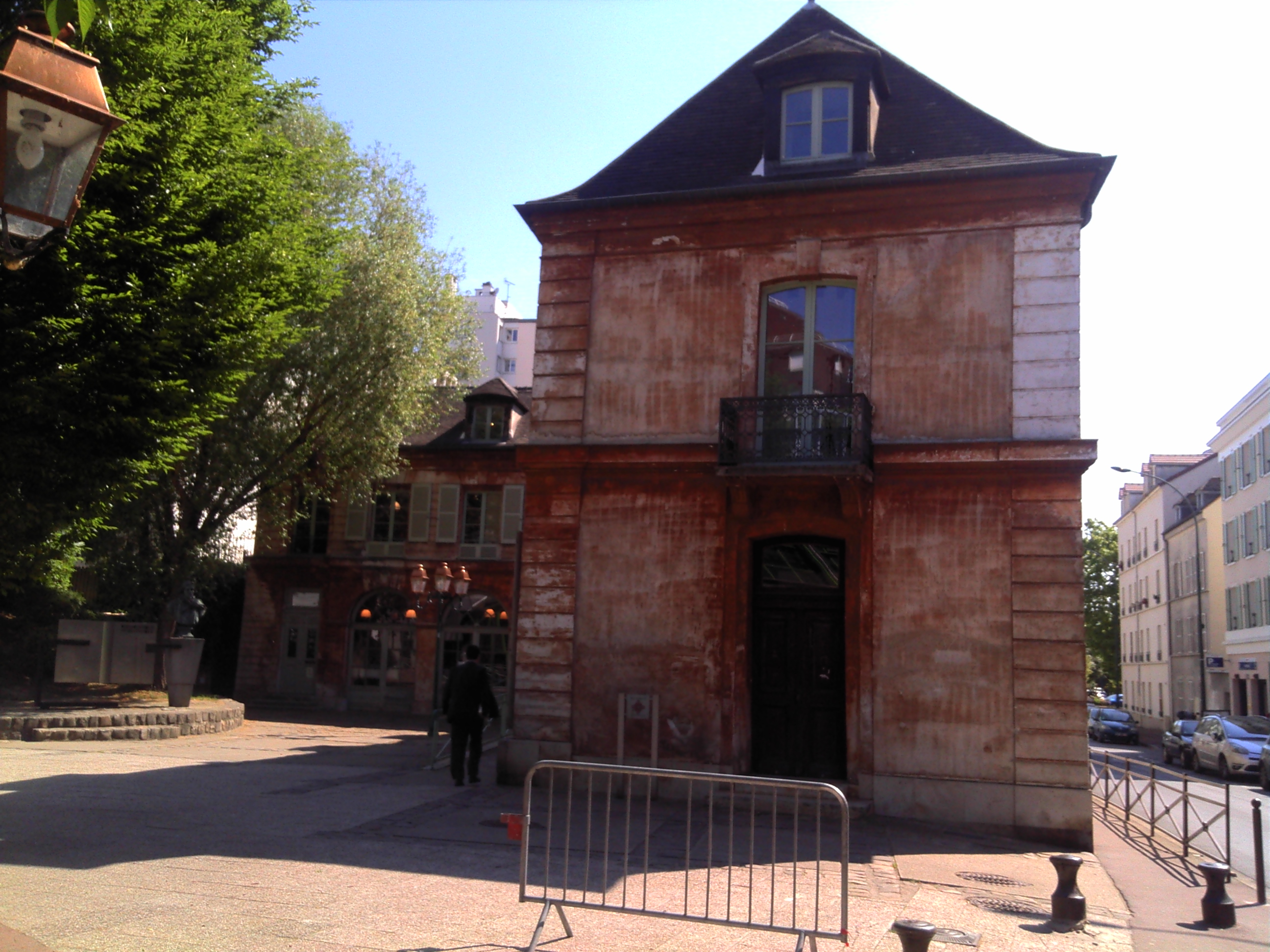 Maison de Delacroix à St-Maurice 94410